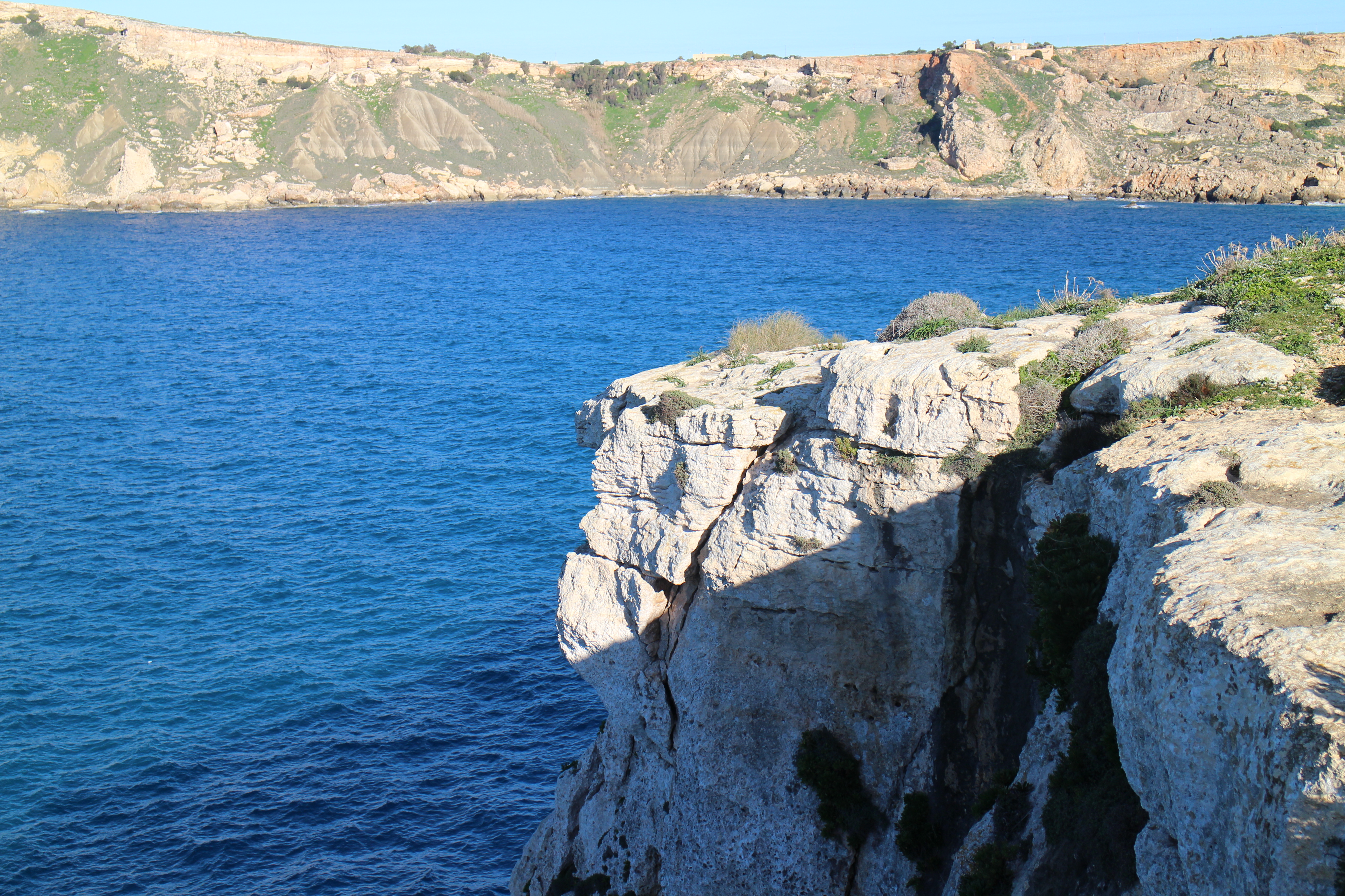 Ras ir-Raheb